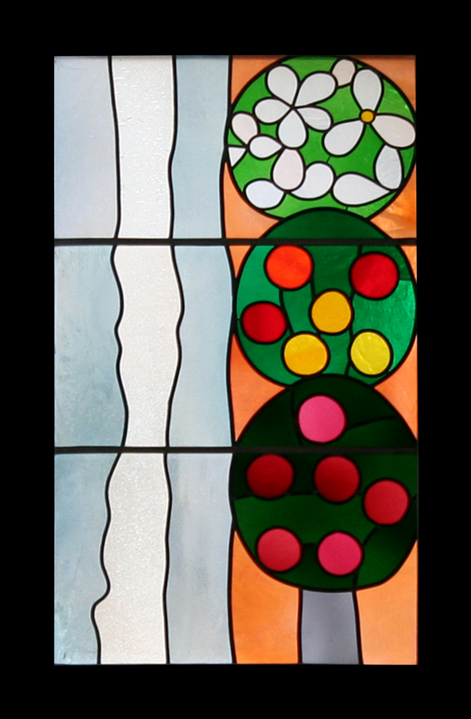 Kloster Ilanz, Klosterkirche, Glasfenster von Max Rüedi